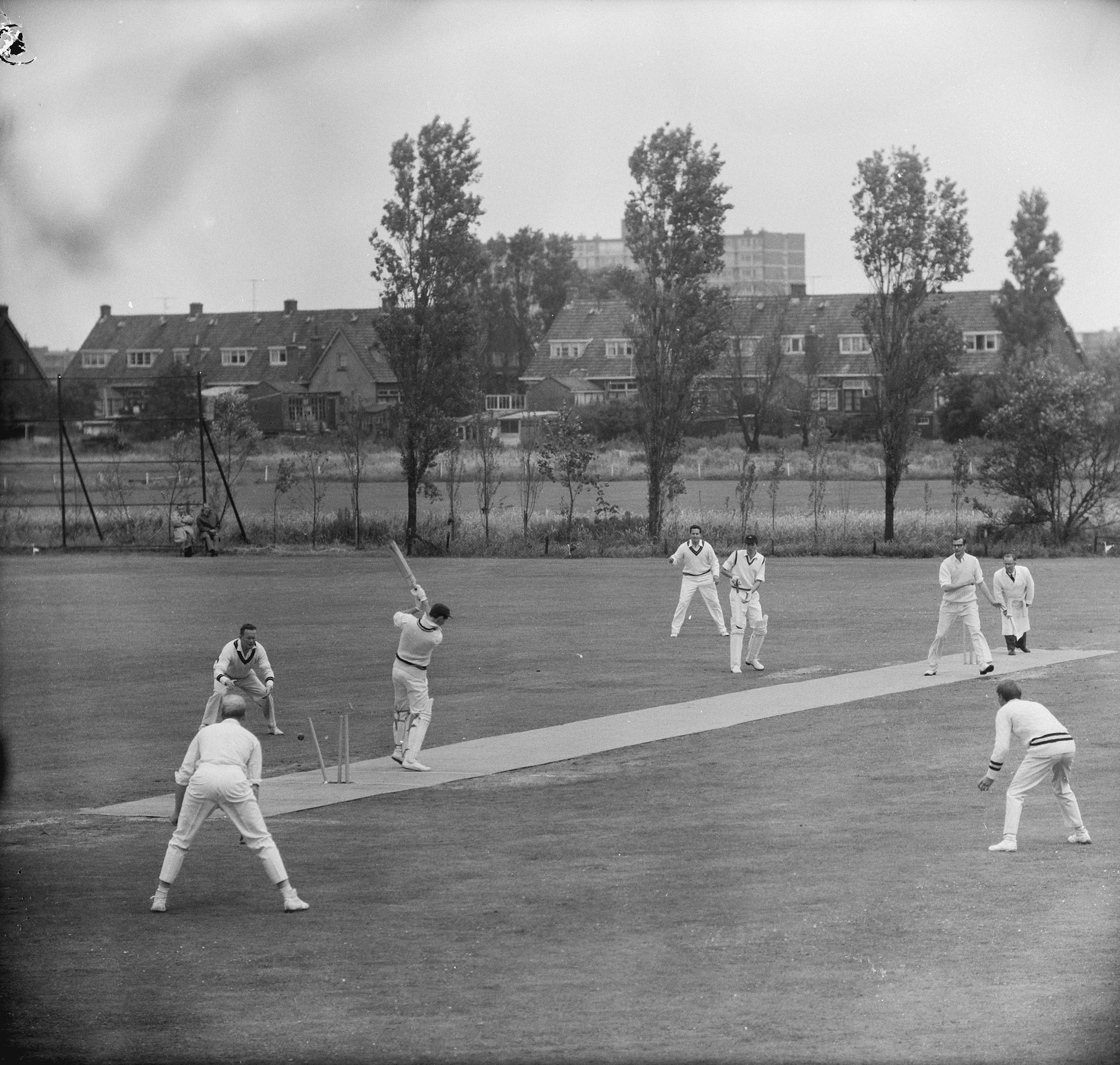 Collectie / Archief : Fotocollectie Anefo Reportage / Serie : [ onbekend ] Beschrijving : Cricket VOC tegen HCC te Rotterdam, Ton Bakker (VOC) "Clean Boweld" op de 1e bal van Peter van Arkel (HCC) Datum : 21 juni 1964 Locatie : Rotterdam, Zuid-Holland Trefwoorden : CRICKET, ballen Persoonsnaam : HCC Fotograaf : Nijs, Jac. de / Anefo Auteursrechthebbende : Nationaal Archief Materiaalsoort : Negatief (zwart/wit) Nummer archiefinventaris : bekijk toegang 2.24.01.03 Bestanddeelnummer : 916-5614